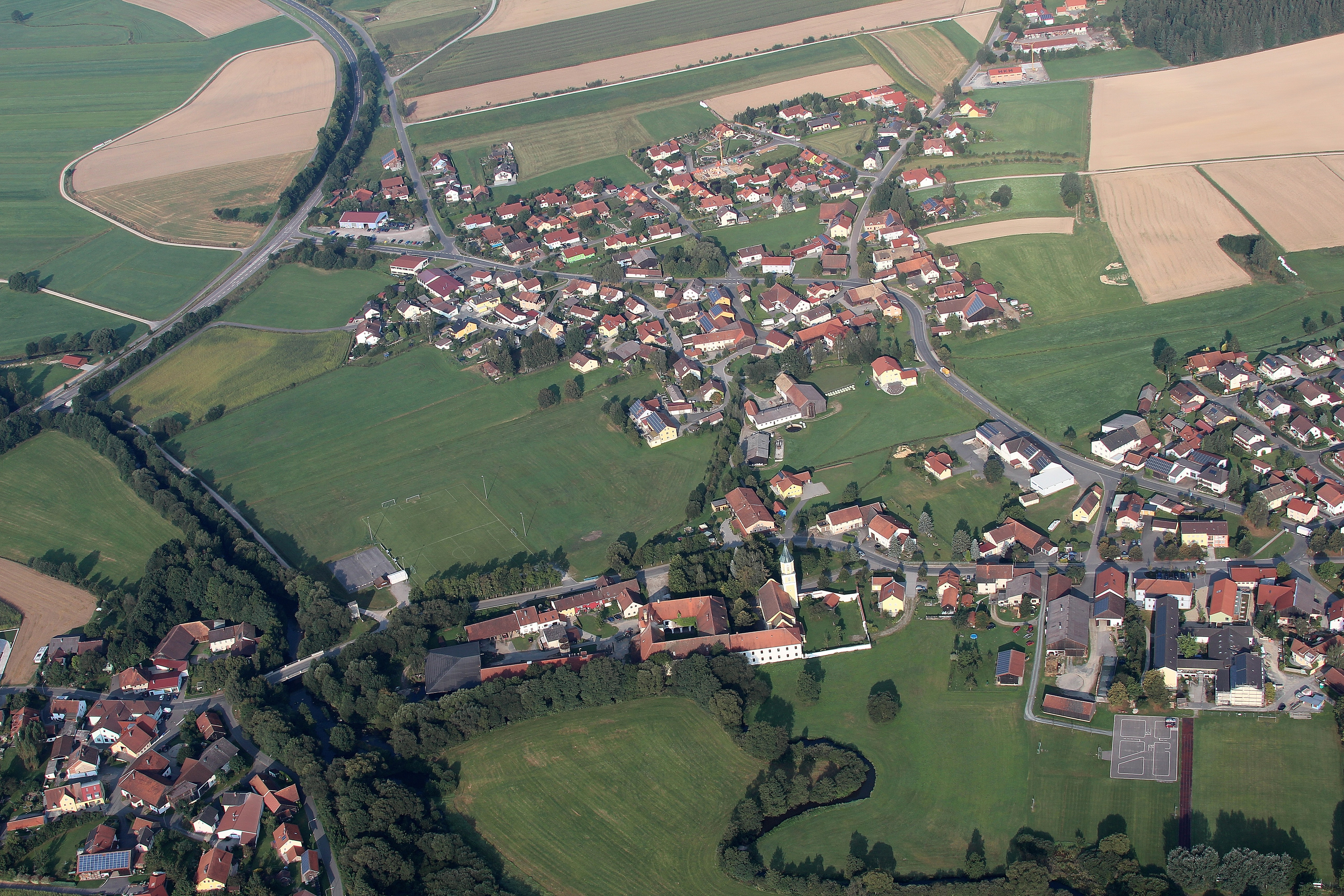 Schönthal, Landkreis Cham, Oberpfalz, Bayern